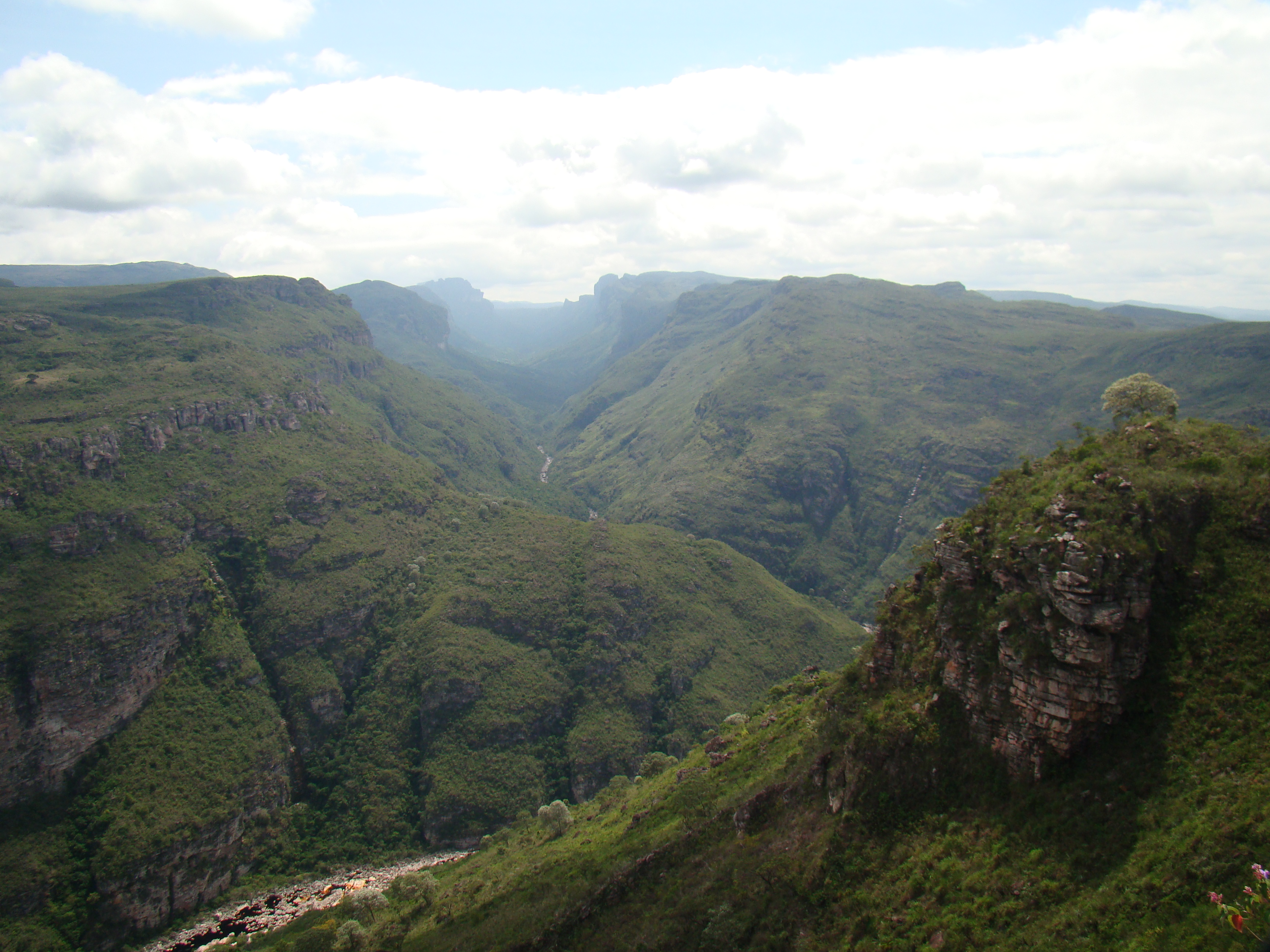 Chapada Diamantina - Rampa do Caim - Bahia - Brasil